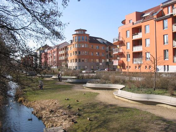 Potsdam-Kirchsteigfeld, Am Hirtengraben.